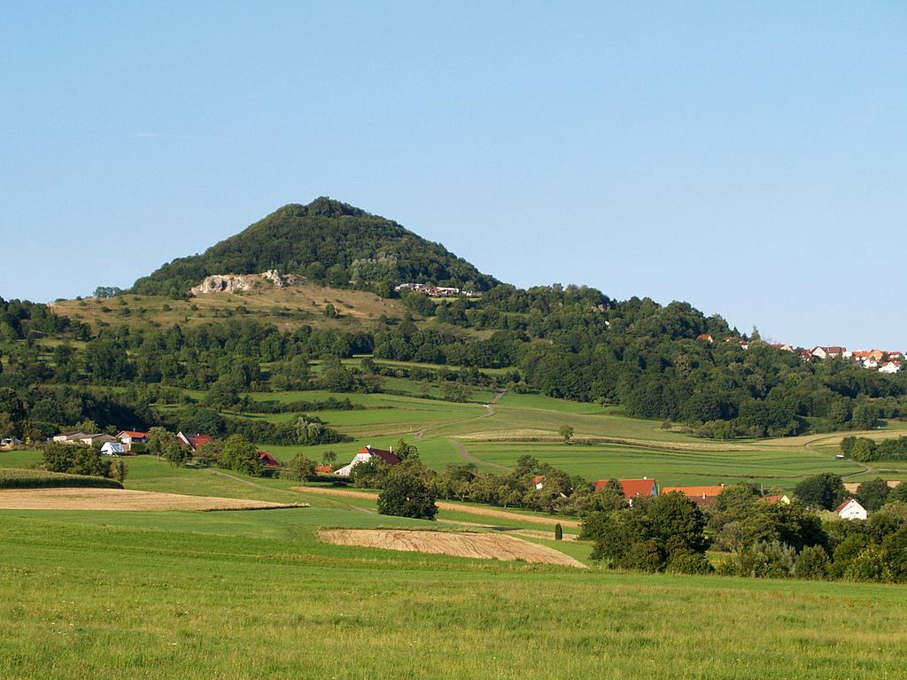 Hohenstaufen von Süden gesehen